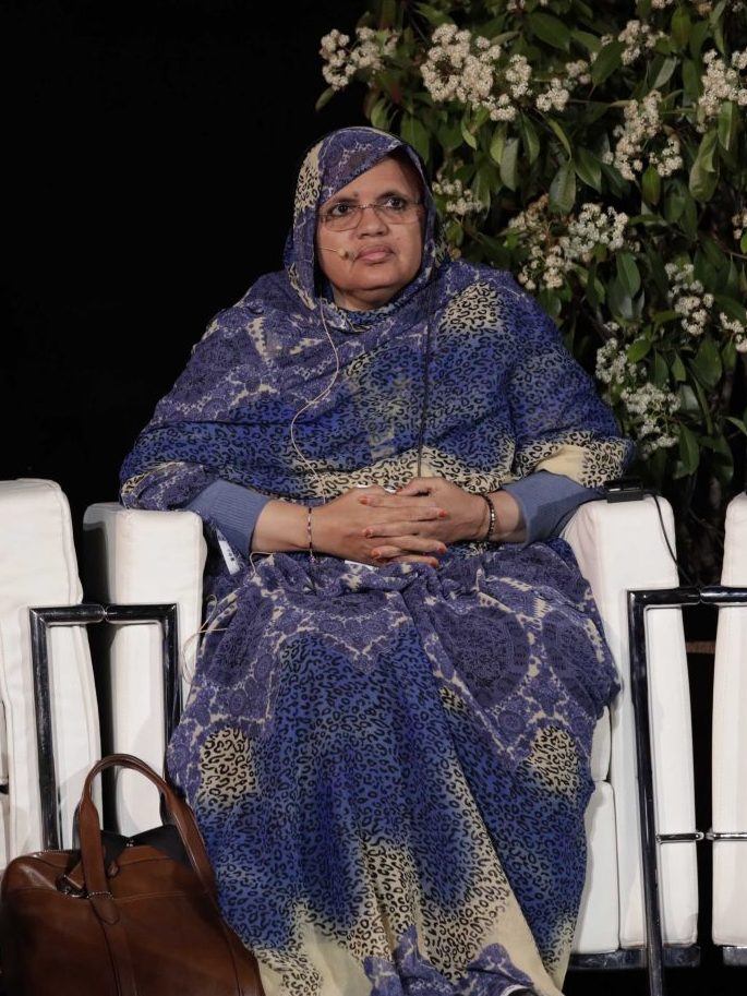 Jornada intensa de análisis sobre cinco de los rostros que muestra la violencia urbana: terrorismo internacional, racismo, acoso escolar y violencia juvenil, bandas juveniles y lgtbfobia. También, de debate abierto sobre los caminos para atajarlas en dos sesiones plenarias, Gobernanza para la Paz y Convivencia Pacífica. Periodistas como Susana Griso, Hilario Pino y Ane Ibarzábal; responsables municipales como Rita Maestre, portavoz del Gobierno municipal de Madrid, y Luis Cueto, coordinador general de la Alcaldía madrileña, y representantes de organismos nacionales e internacionales, como Ana Barrero, presidenta de AiPaz y Jesús Generelo, presidente de la FELGTB, han moderado los distintos encuentros en los que se han dado a conocer experiencias que se están revelando beneficiosas para sus entornos. El cierre de todos lo ha puesto el diálogo abierto y directo de los asistentes con los ponentes.